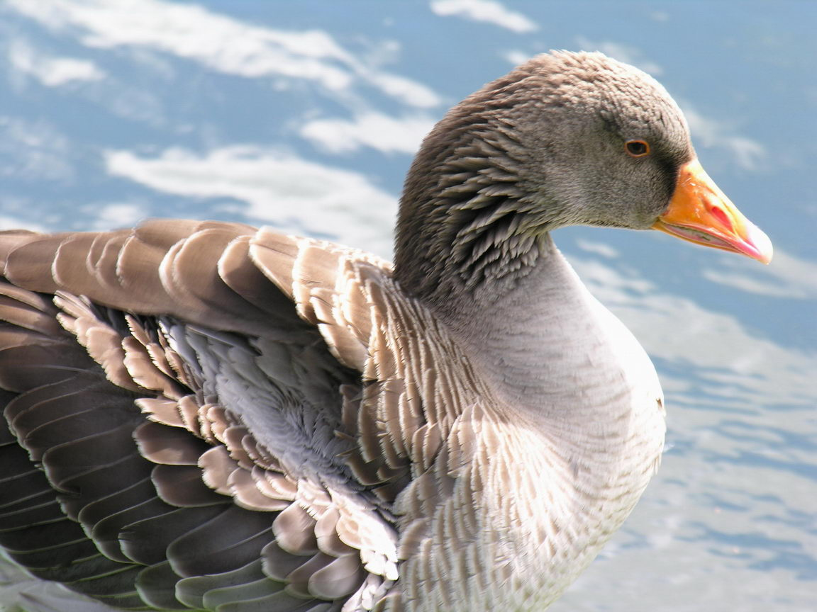 self made.